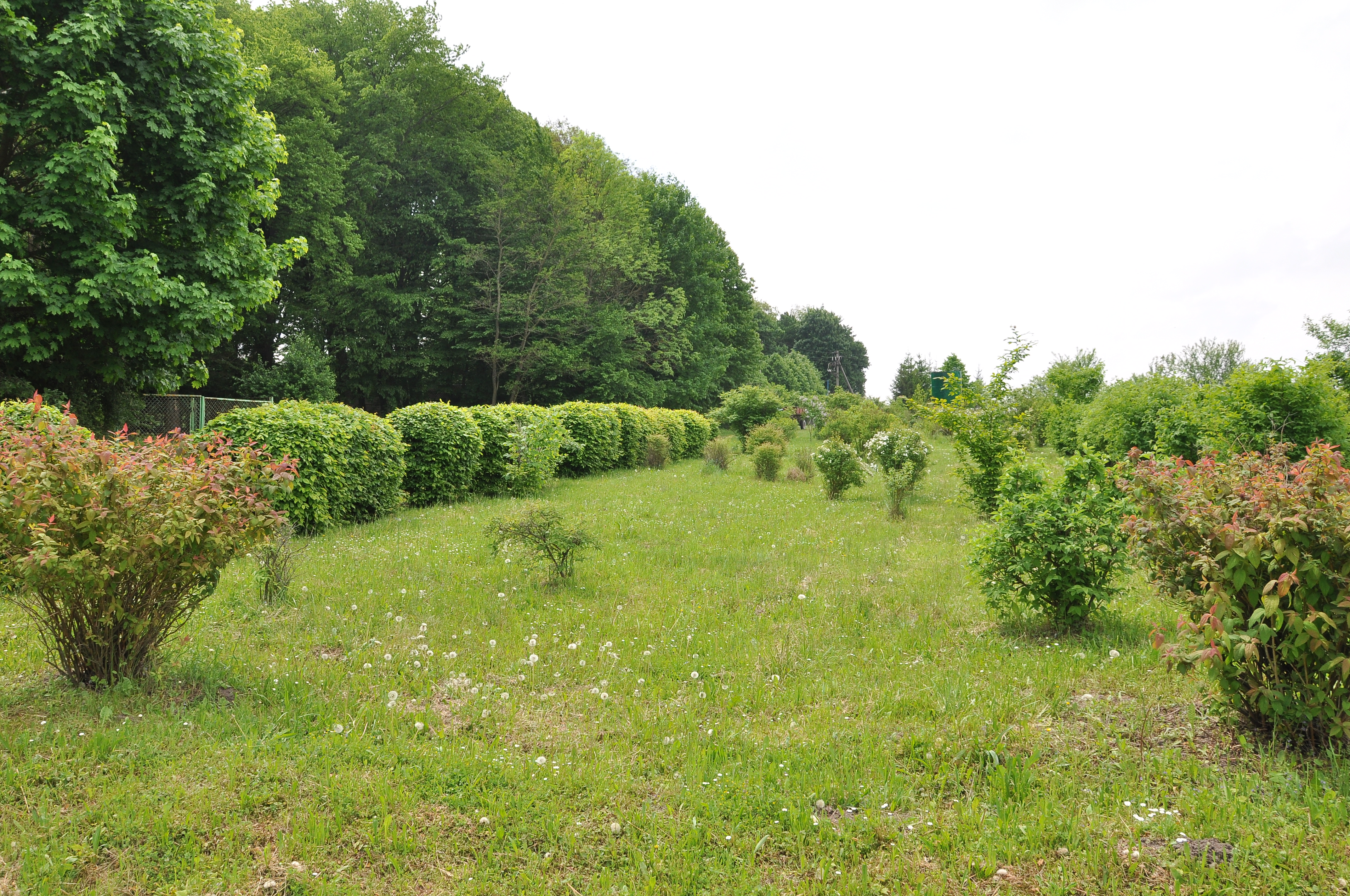 Ботанічний сад «Червона калина» на території навчально-оздоровчого комплексу «Червона калина» Тернопільського державного медичного університету поблизу смт Дружба та с. Лошнів Теребовлянського району.